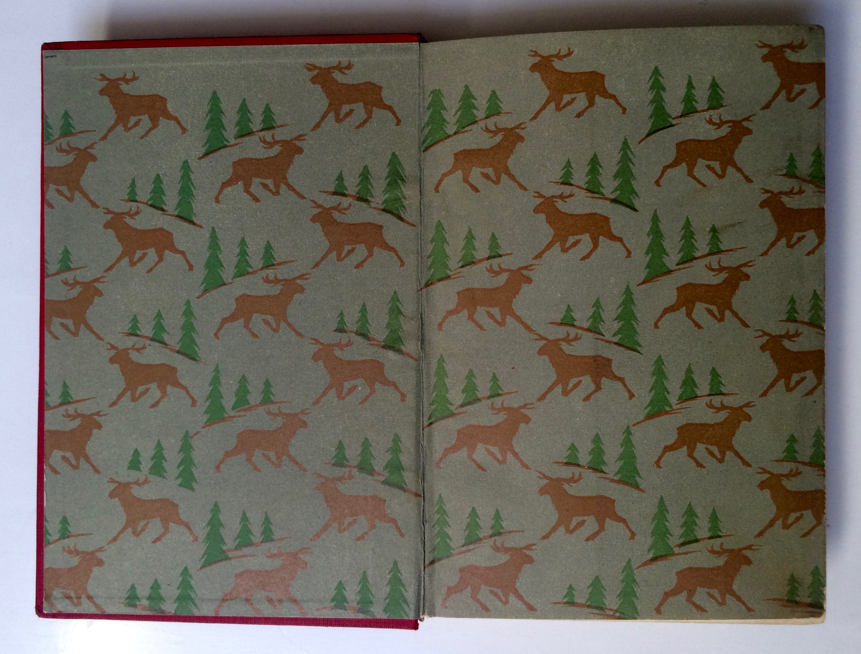 Põdramotiiv eeslehel